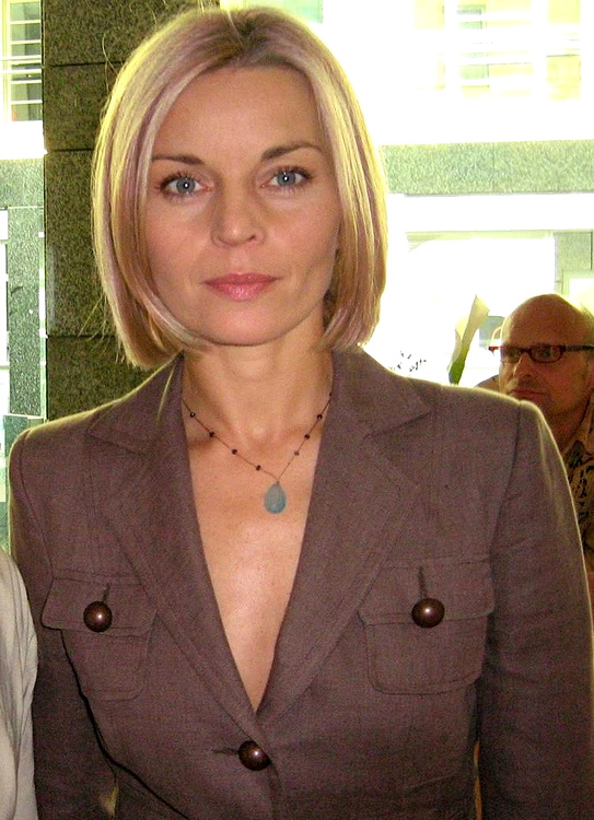 Małgorzata Foremniak-Jędruszczak (ur. 8 stycznia 1967 w Radomiu) – polska aktorka.